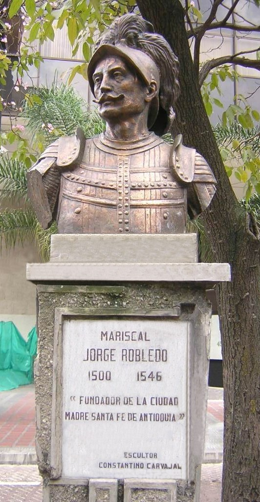 Busto de Jorge Robledo, ubicado en la Av. la Playa, Medellín, Colombia